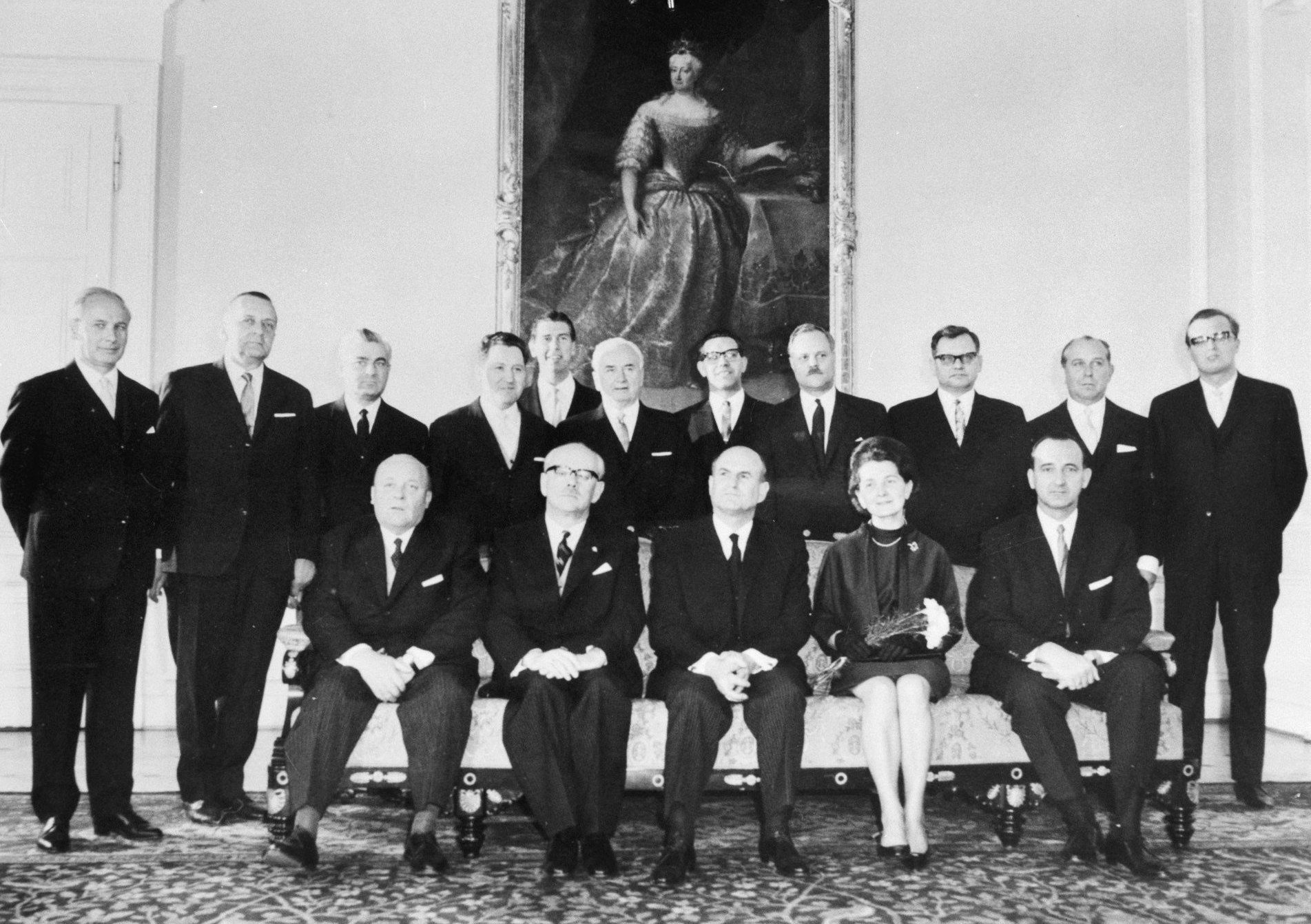 Collectie / Archief : Fotocollectie Anefo Reportage / Serie : [ onbekend ] Beschrijving : Nieuwe Oostenrijkse kabinet Annotatie : Repronegatief Datum : 21 april 1966 Locatie : Oostenrijk Trefwoorden : kabinetten Fotograaf : Basch, Fritz Auteursrechthebbende : Nationaal Archief Materiaalsoort : Negatief (zwart/wit) Nummer archiefinventaris : bekijk toegang 2.24.01.04 Bestanddeelnummer : 919-0579